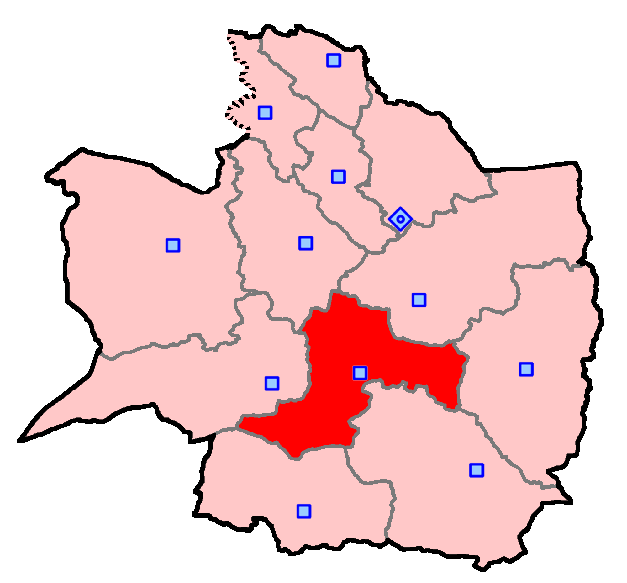 حوزهٔ انتخاباتی تربت حیدریه برای انتخابات مجلس شورای اسلامی